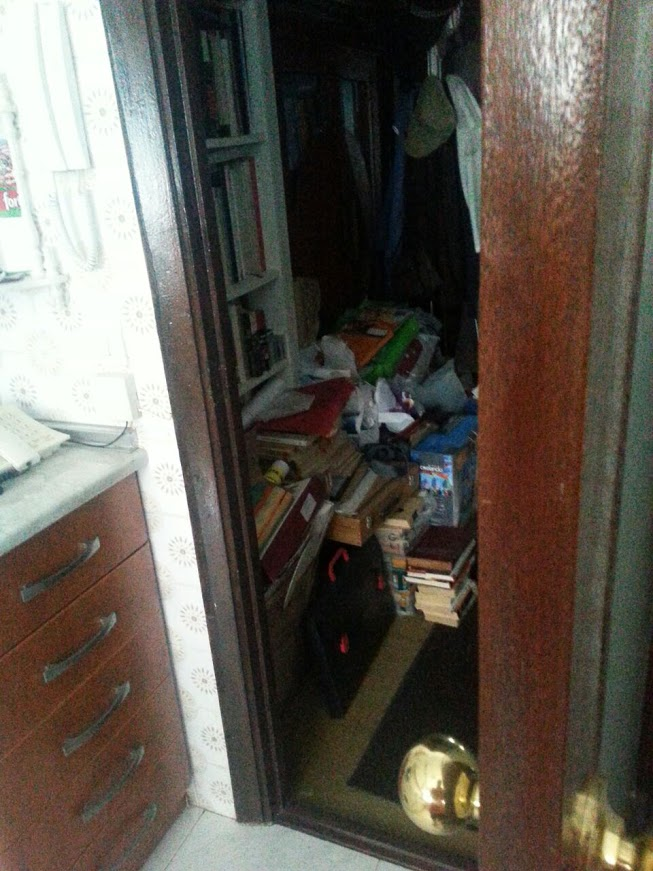 Balio gutxiko gauzak metatzeko joera neurrigabea: Diogenes nahasdura.